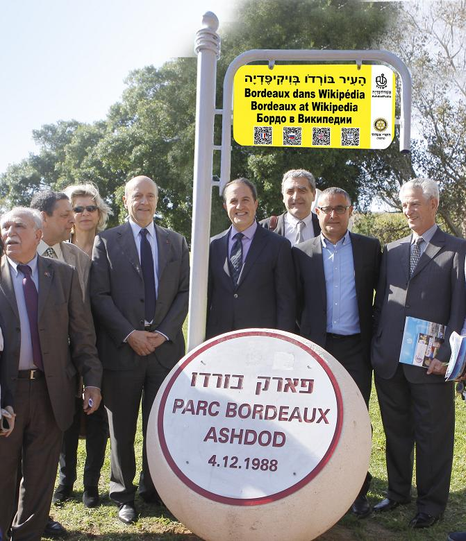 אלן ז'ופה, ד"ר יחיאל לסרי, פארק בורדו, אשדוד.